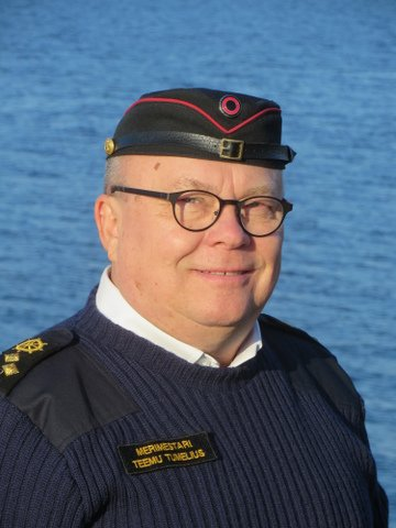 Merimestari Teemu Tumelius, henkilökuva